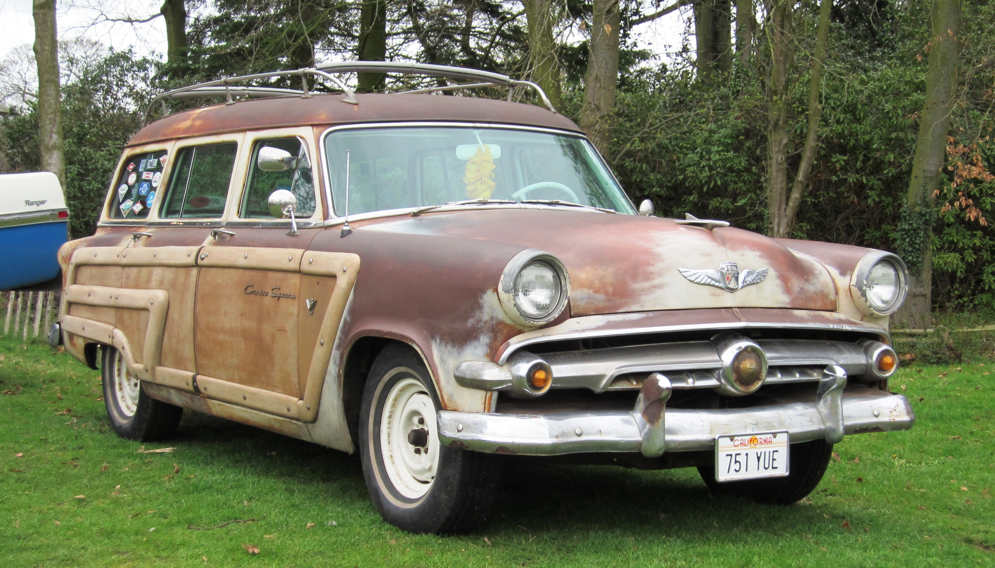 Ford Country Squire at Weston Park